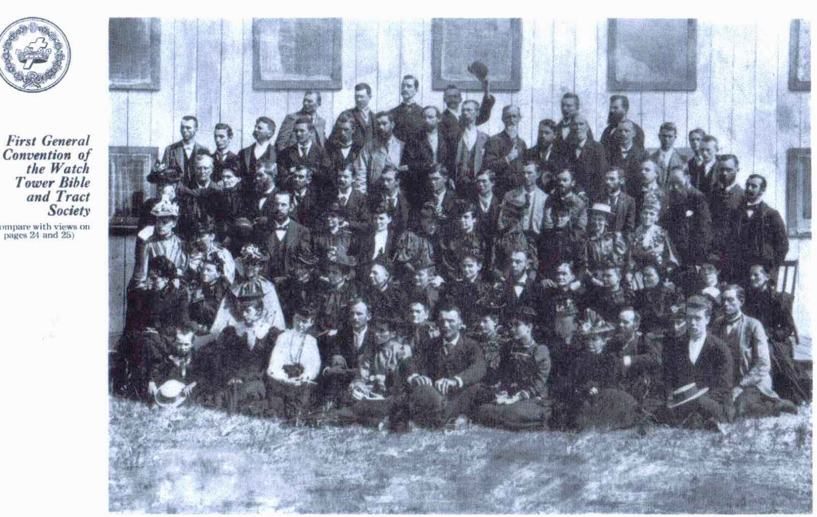 Uczestnicy Pierwszej Konwencji Generalnej Badaczy Pisma Świętego, sierpień 1893 Chicago